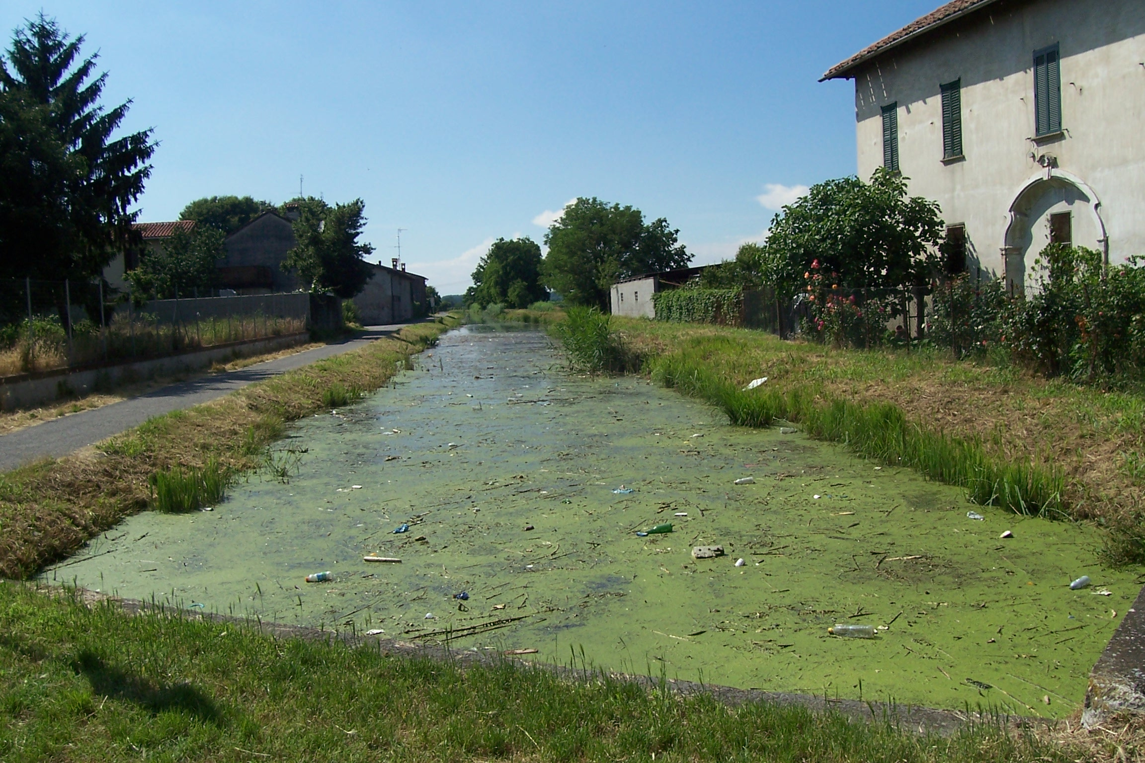 La fine del Naviglio di Bereguardo nel Centro di Bereguardo